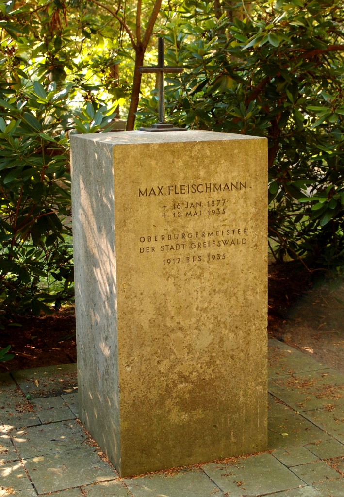 Grab des Juristen und Politikers Max Fleischmann (1877-1935) auf dem Alten Friedhof in Greifswald.